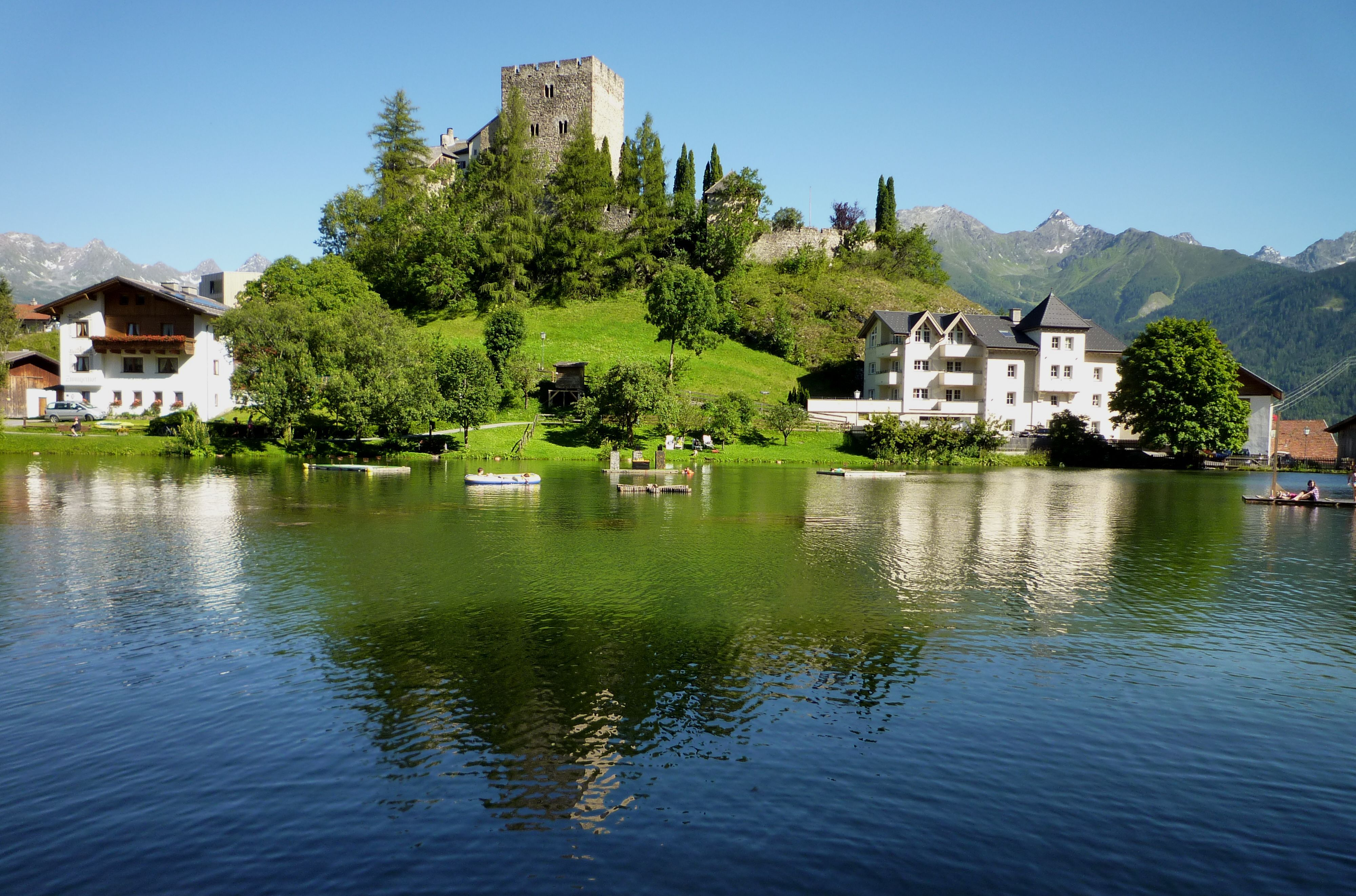 Ladis - Wohnturm der Burg Laudegg um 1200, See